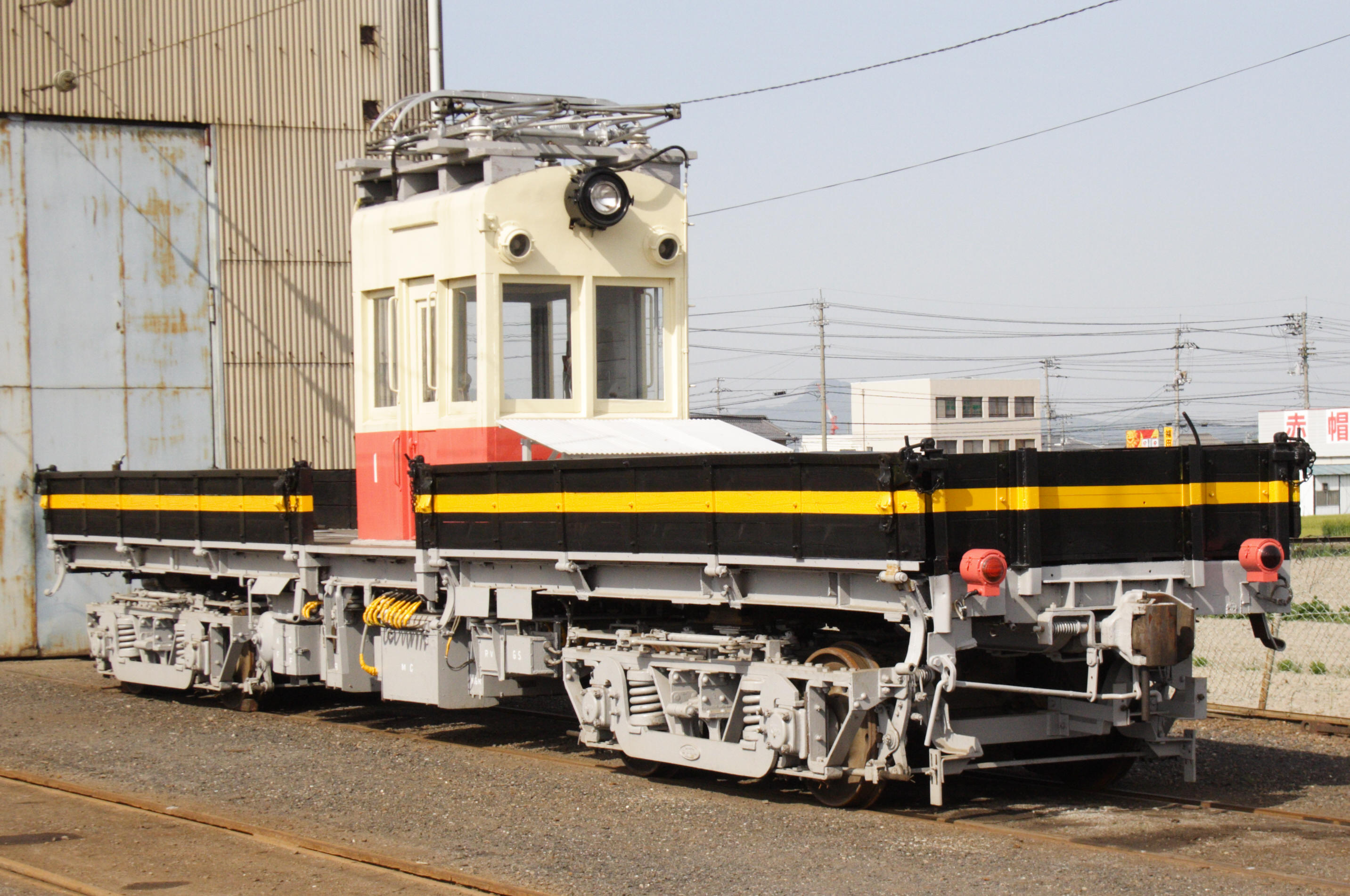 琴電デカ1形（仏生山にて車庫公開の時に撮影）